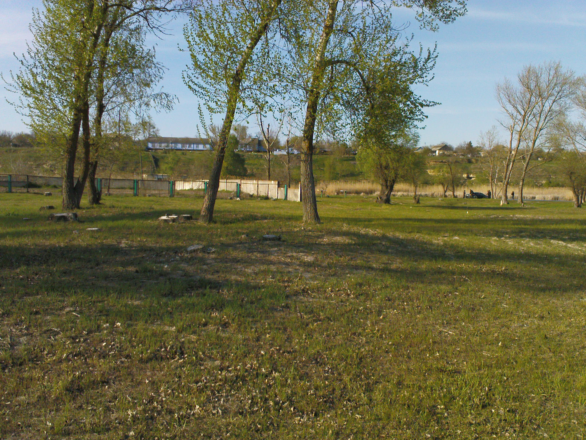 Бывший пионерский лагерь